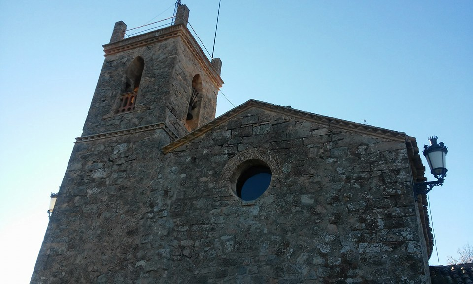 Campanar i església de Sant Martí de Maçana.